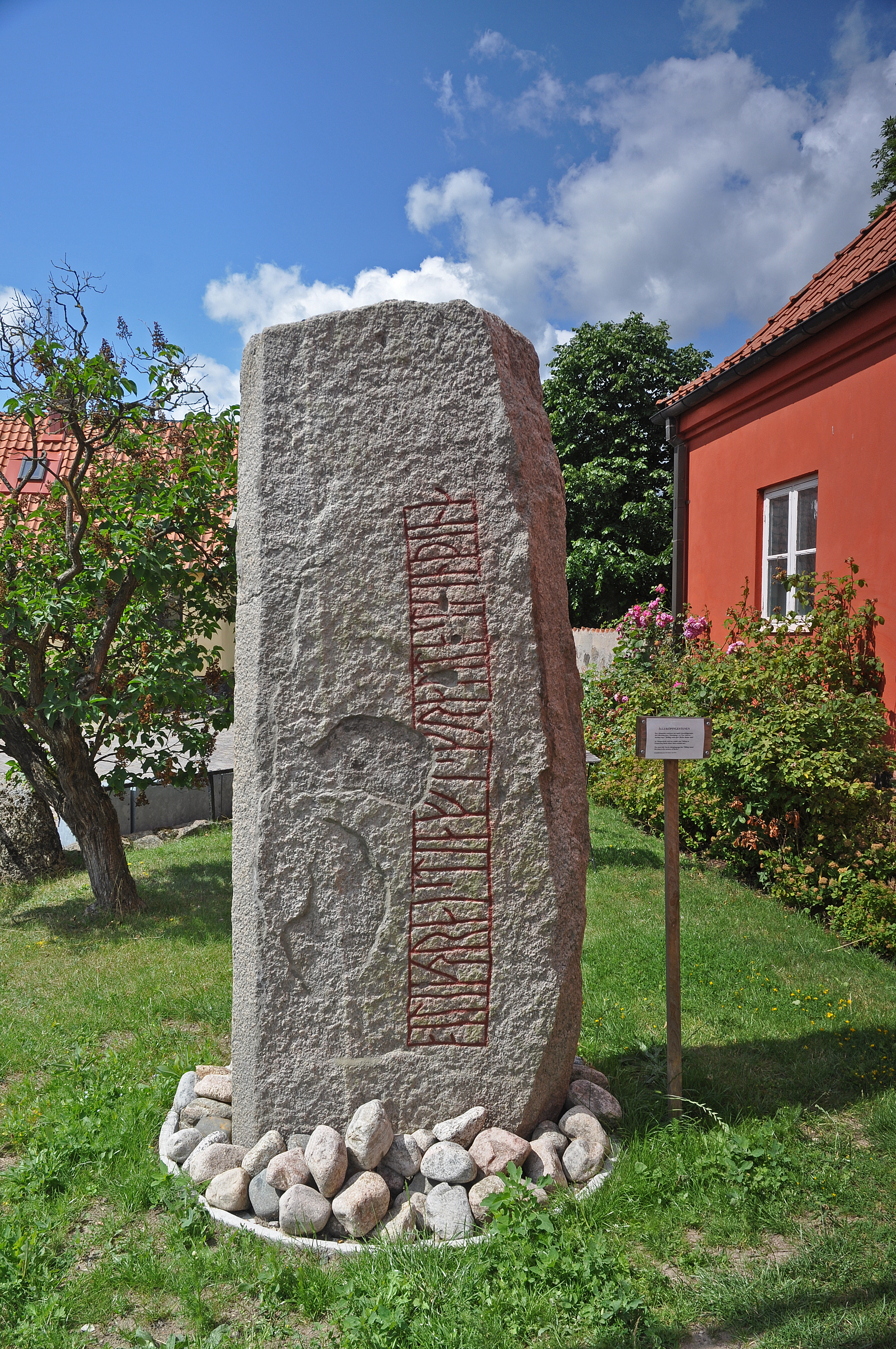 Hittad vid Åhus 2:4. Runsten runinskrift DR EM85;377, den så kallade Älleköpingestenen, Åhus 2:2. Stod vid fotograferingstillfället 2015 utanför vid Åhus museum nära Åhus kyrka i Skånes län.